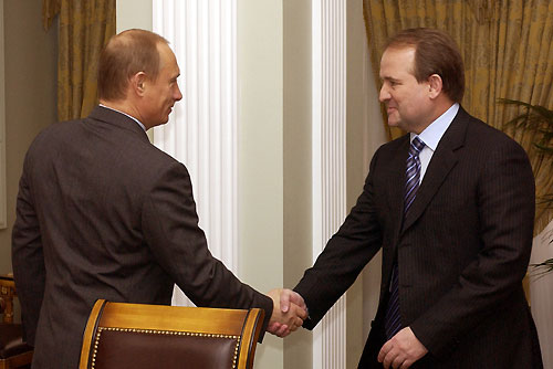 Ново-Огарево. Зустріч із головою адміністрації Президента України Віктором Медведчуком.